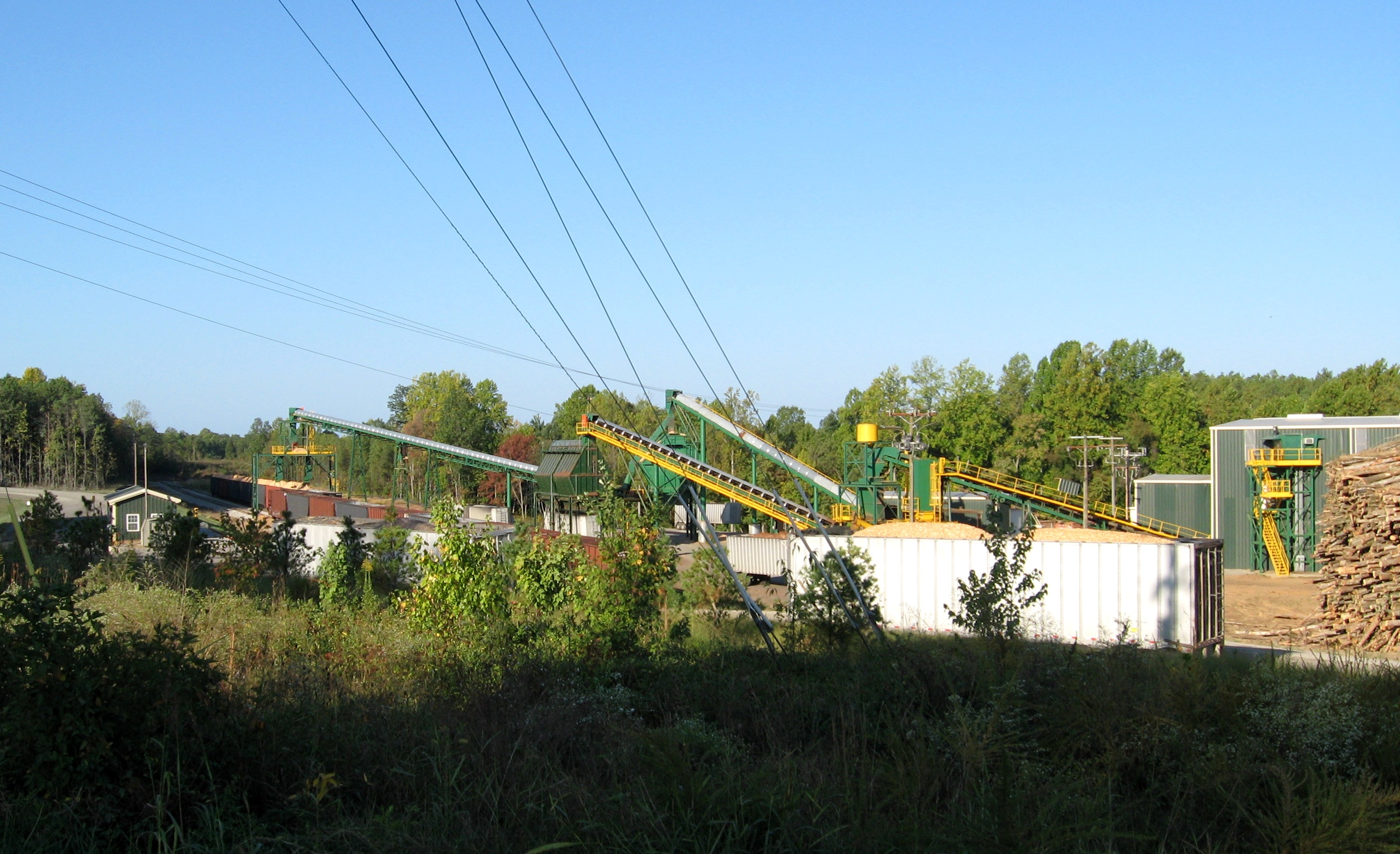 7, VA, USA